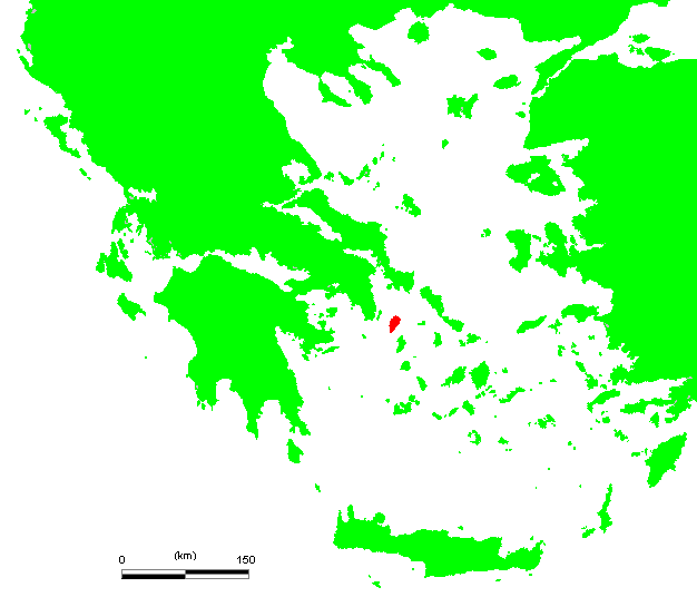 GR Kea.PNG (Greek island)